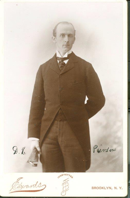 델라반 피어선의 모습(프린스턴 대학 졸업시에 찍은 사진, 공개함)